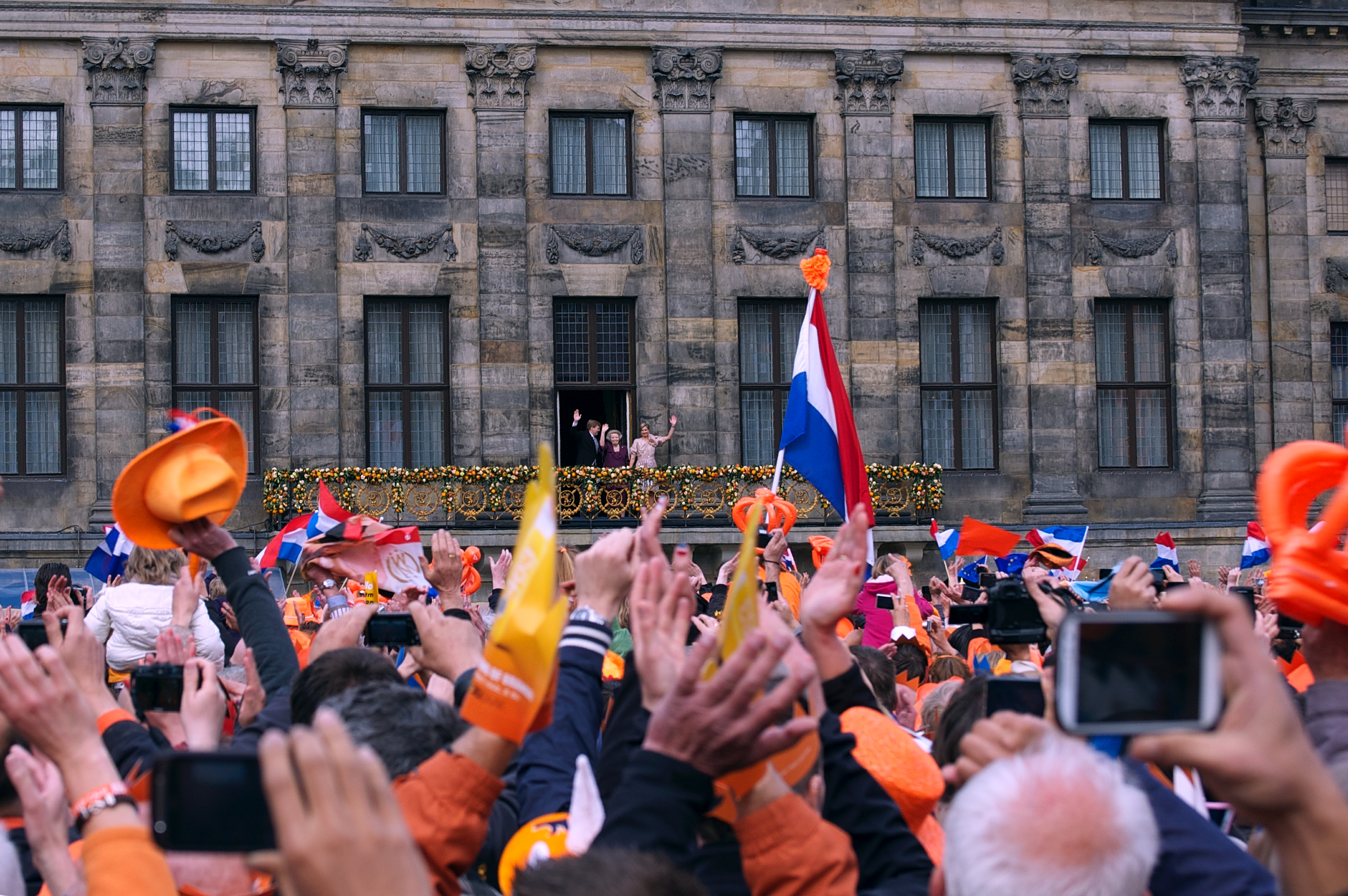 Het publiek zwaait naar Koning Willem-Alexander, prinses Beatrix en koningin Máxima. Foto genomen op de Dam na de abdicatie van Beatrix.